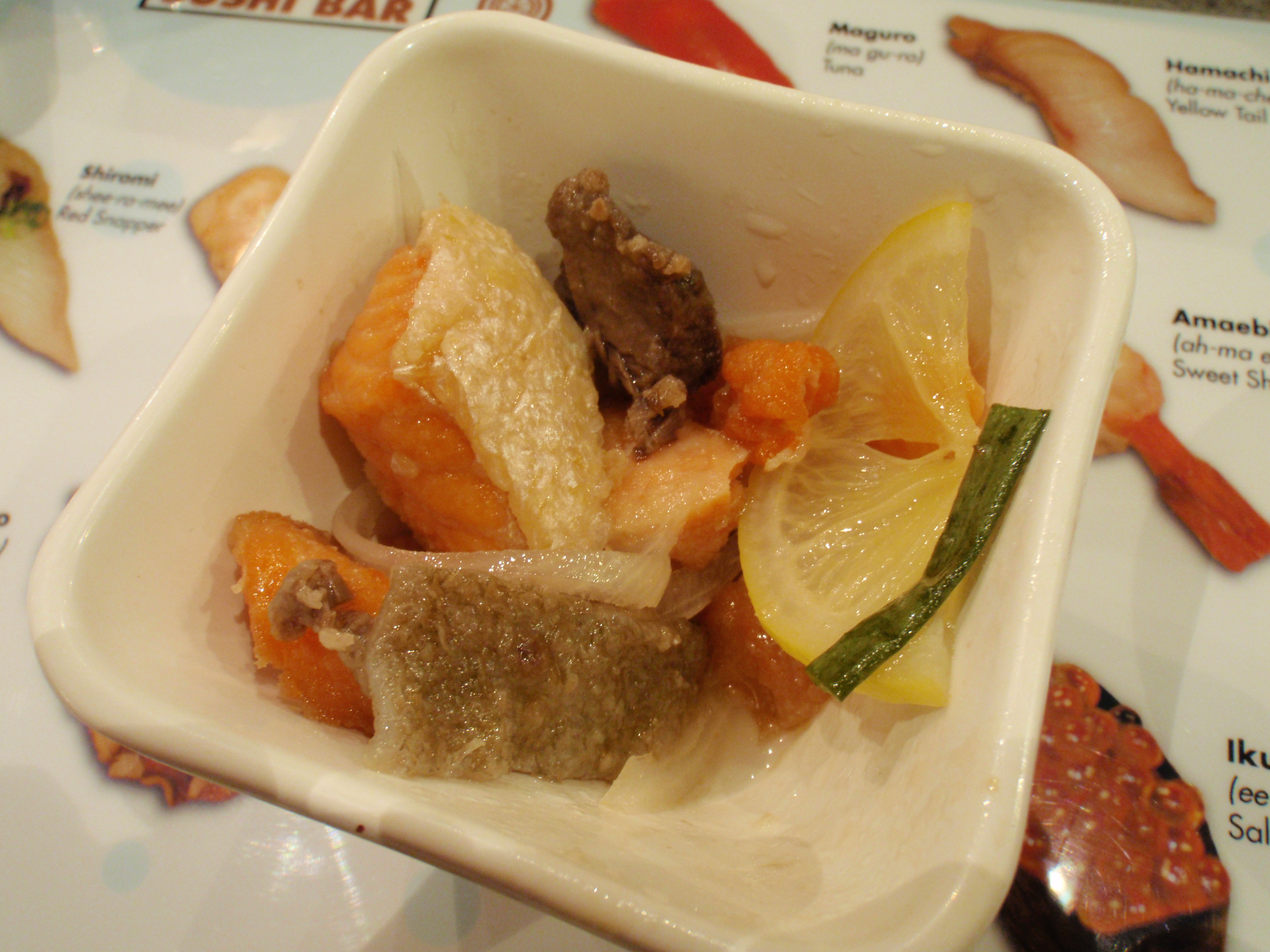 Sake Nanbanzuke